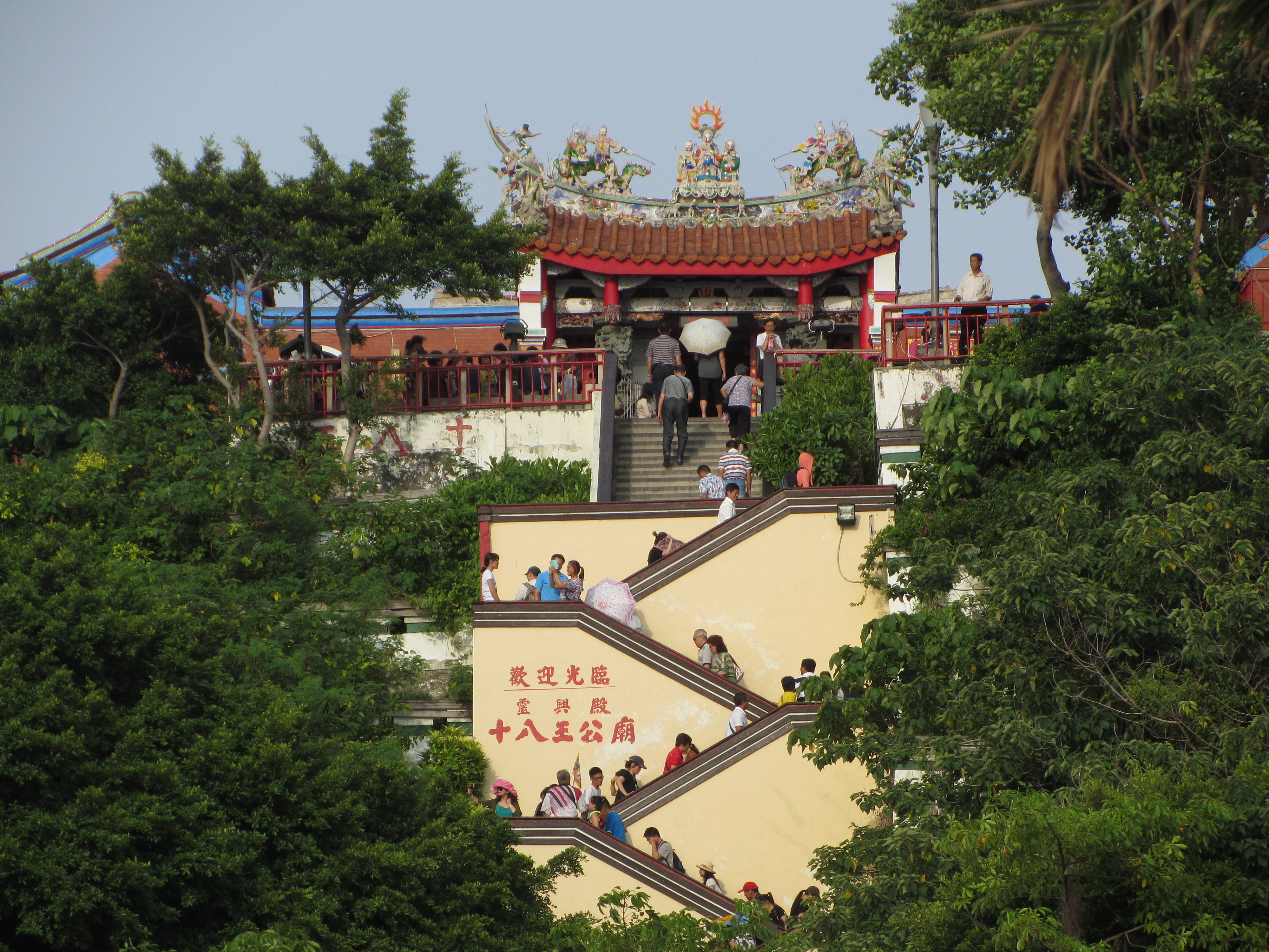 在西子灣望向靈興殿（十八王公廟）